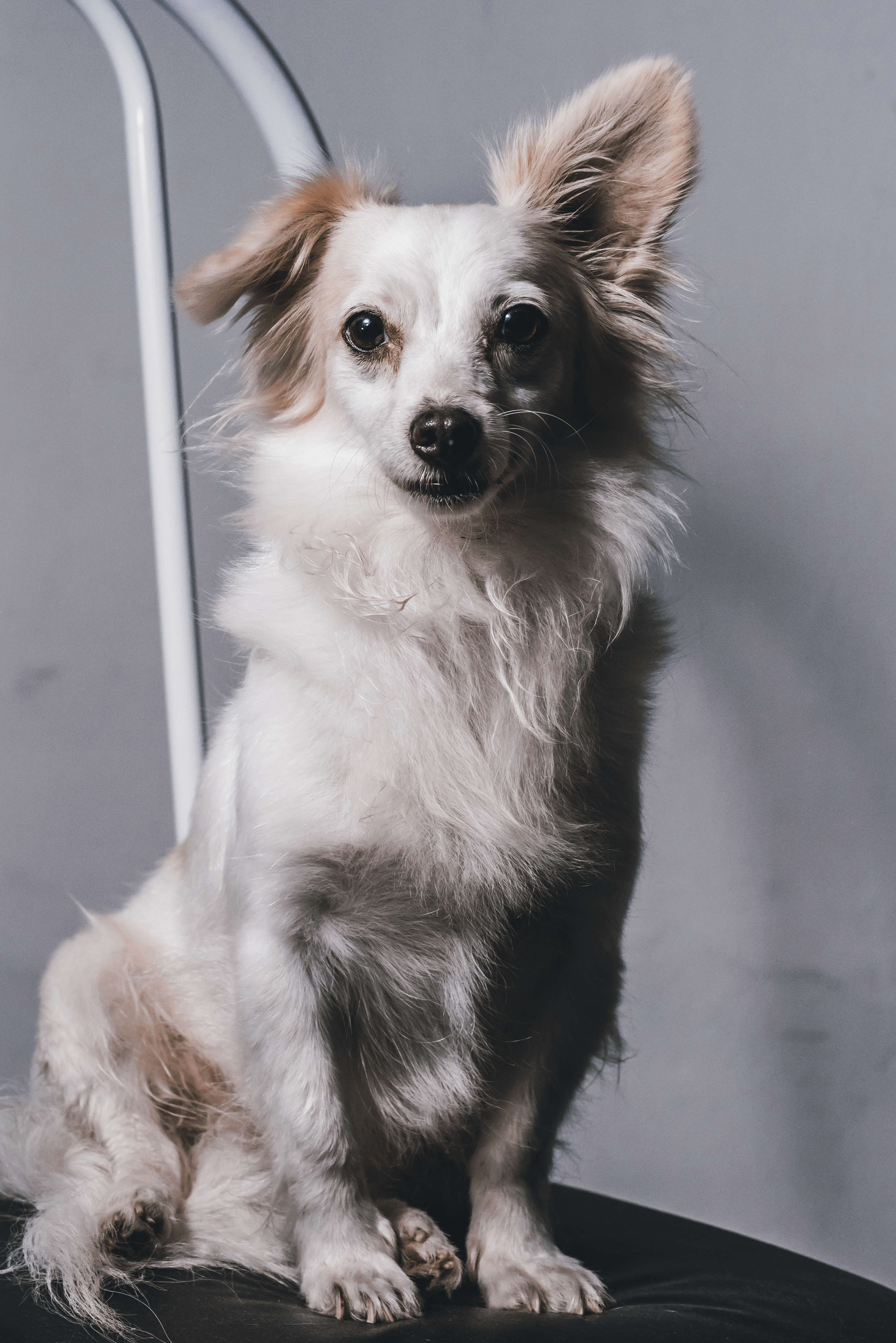 Raça Kokoni.